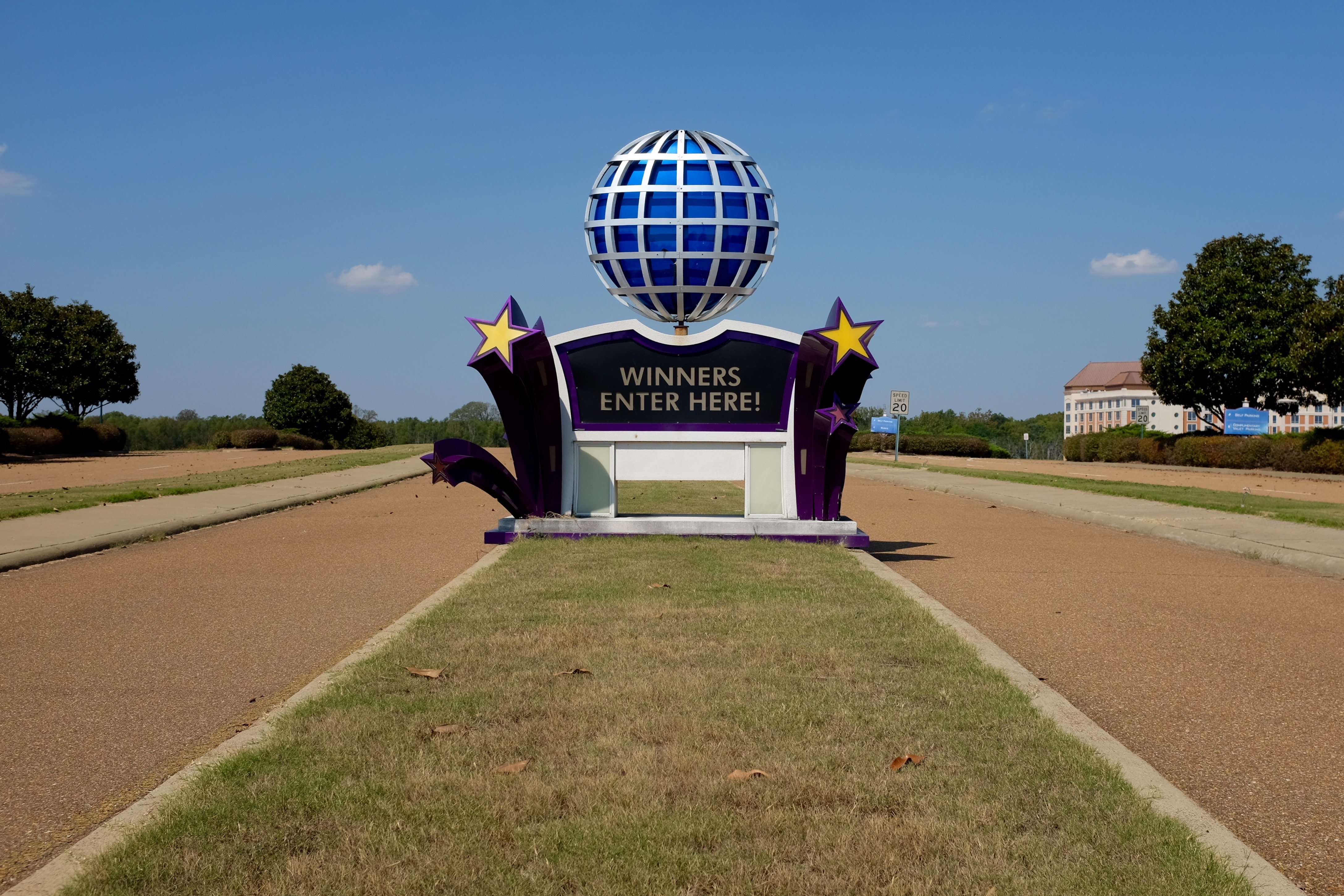 Abandoned Harrah's Casino Tunica, Robinsonville, Mississippi.